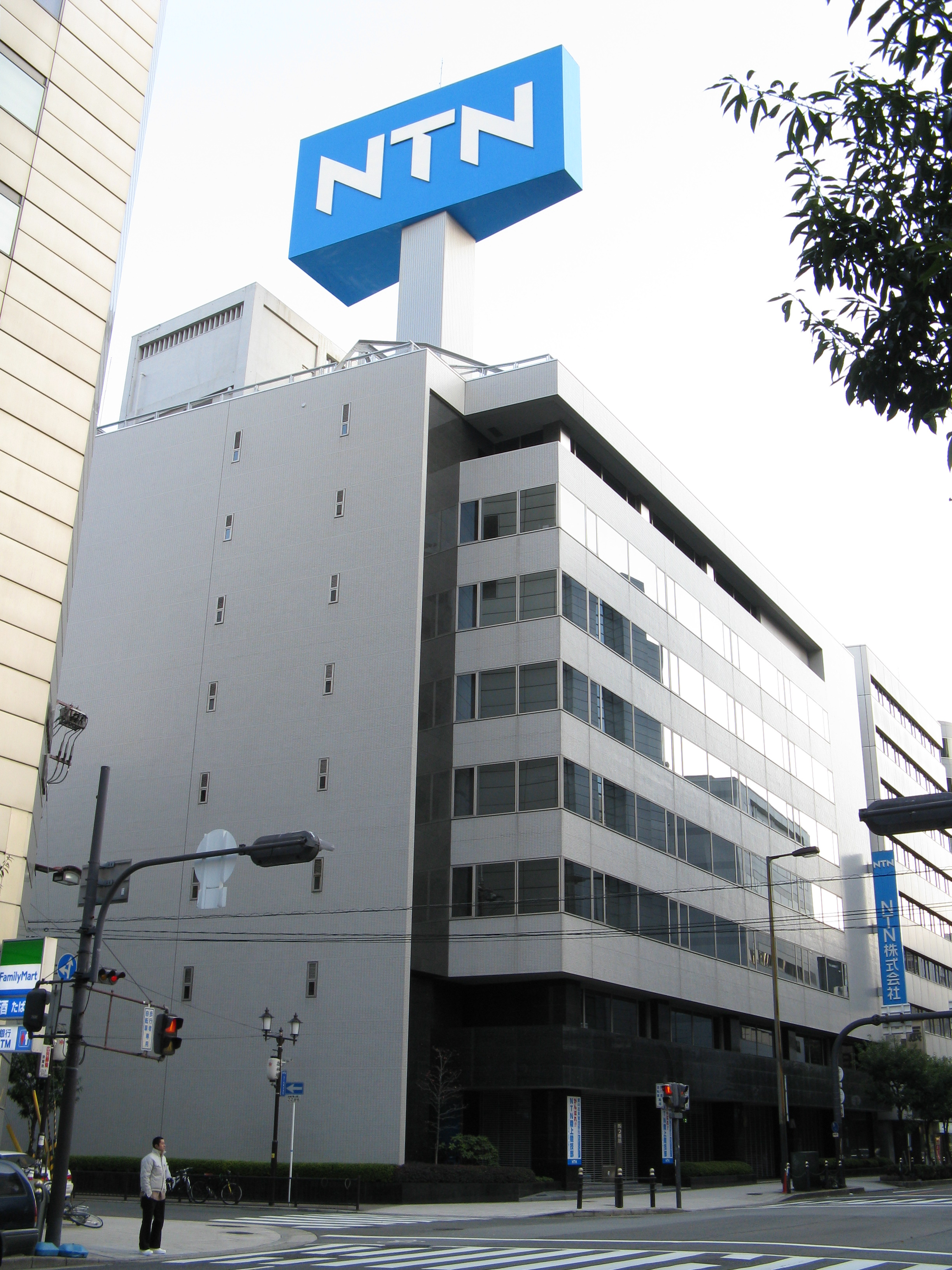 NTN株式会社